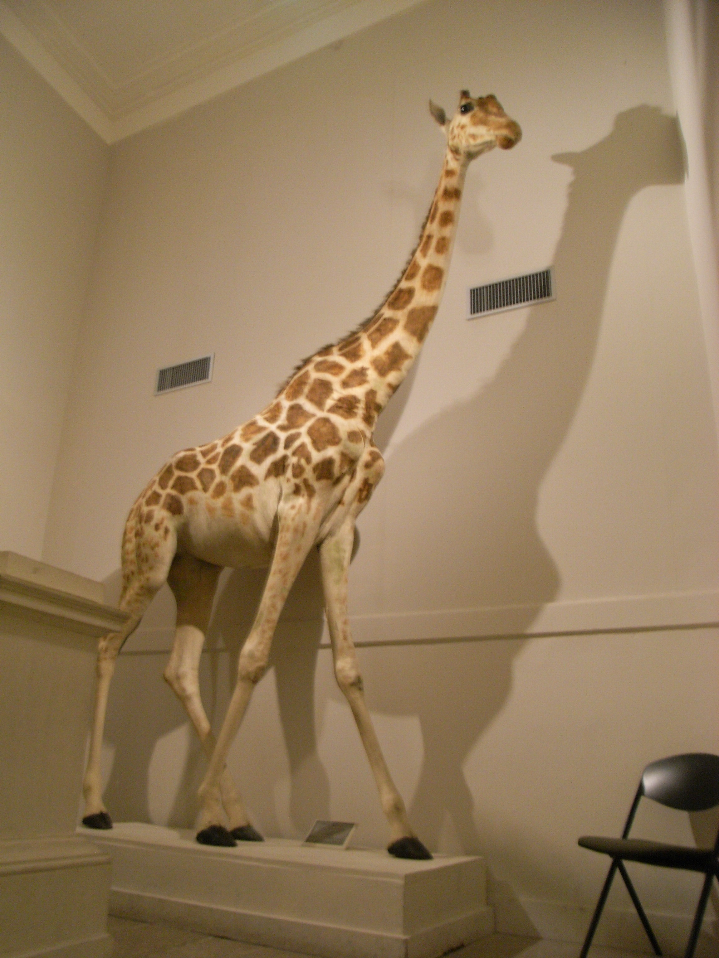 Girafe au Muséum d'histoire naturelle sis 28 rue Albert 1er à La Rochelle (Charente-Maritime - France).